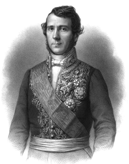 Jean-Étienne-Théodore Ducos